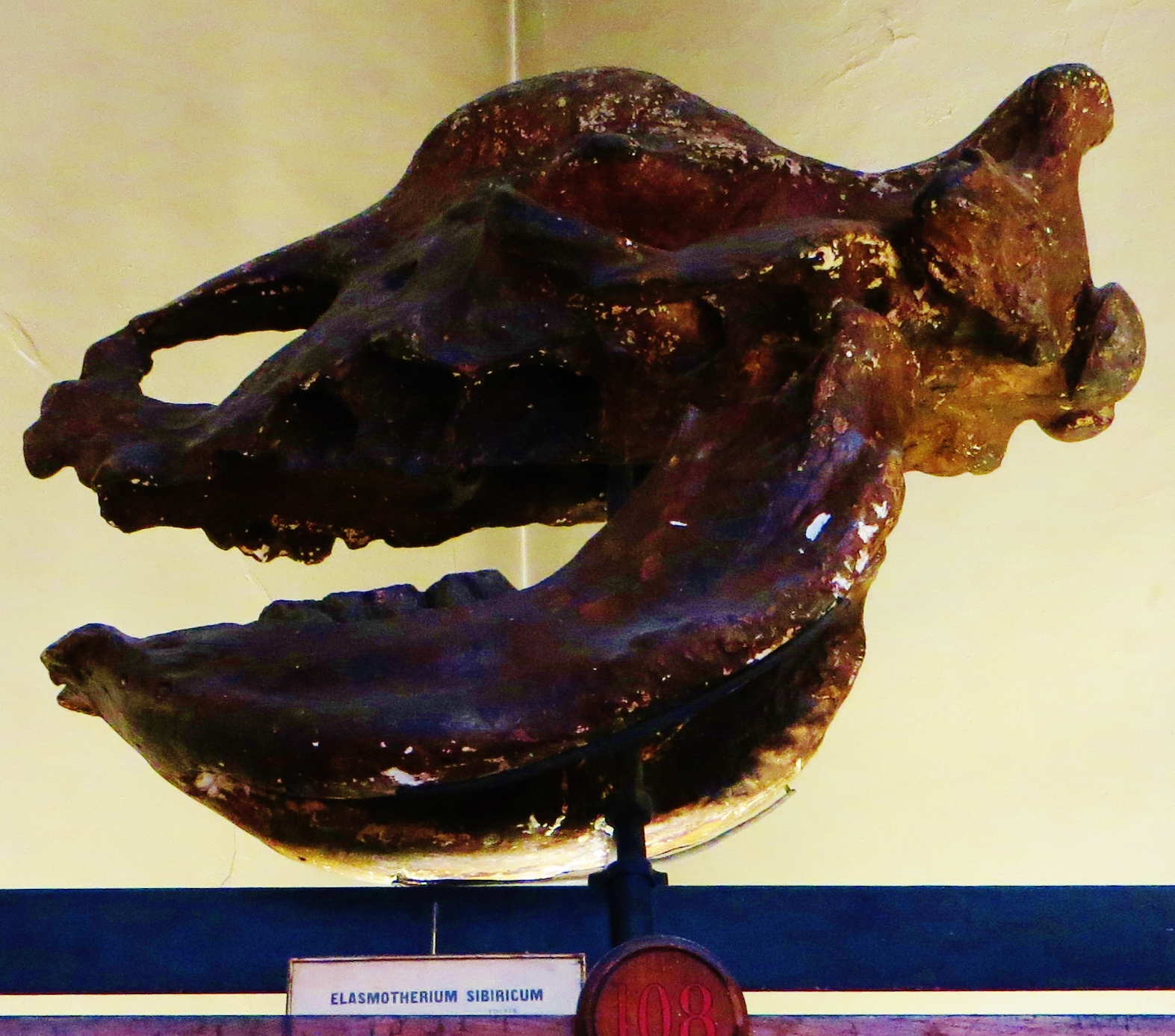 Fossil of Elasmotherium, an extinct mammal- Took the photo at Musee d'Histoire Naturelle, Paris